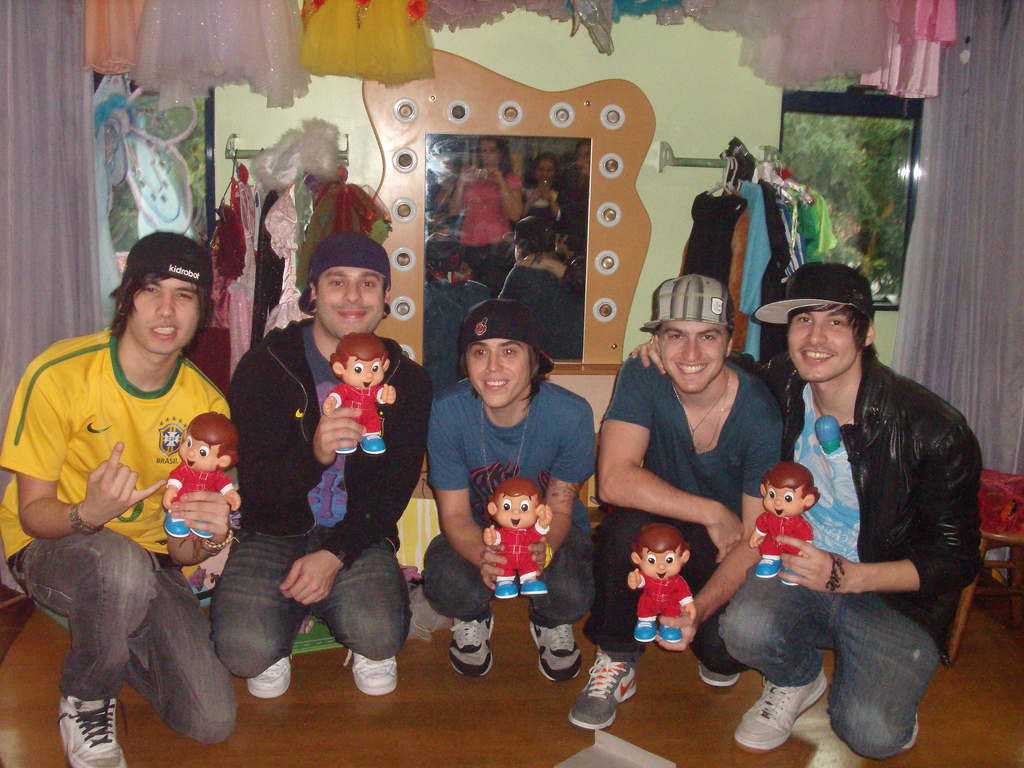 Banda Cine com Senninha no GRAACC (Grupo de Apoio ao Adolescente e à Criança com Câncer) em 2010.